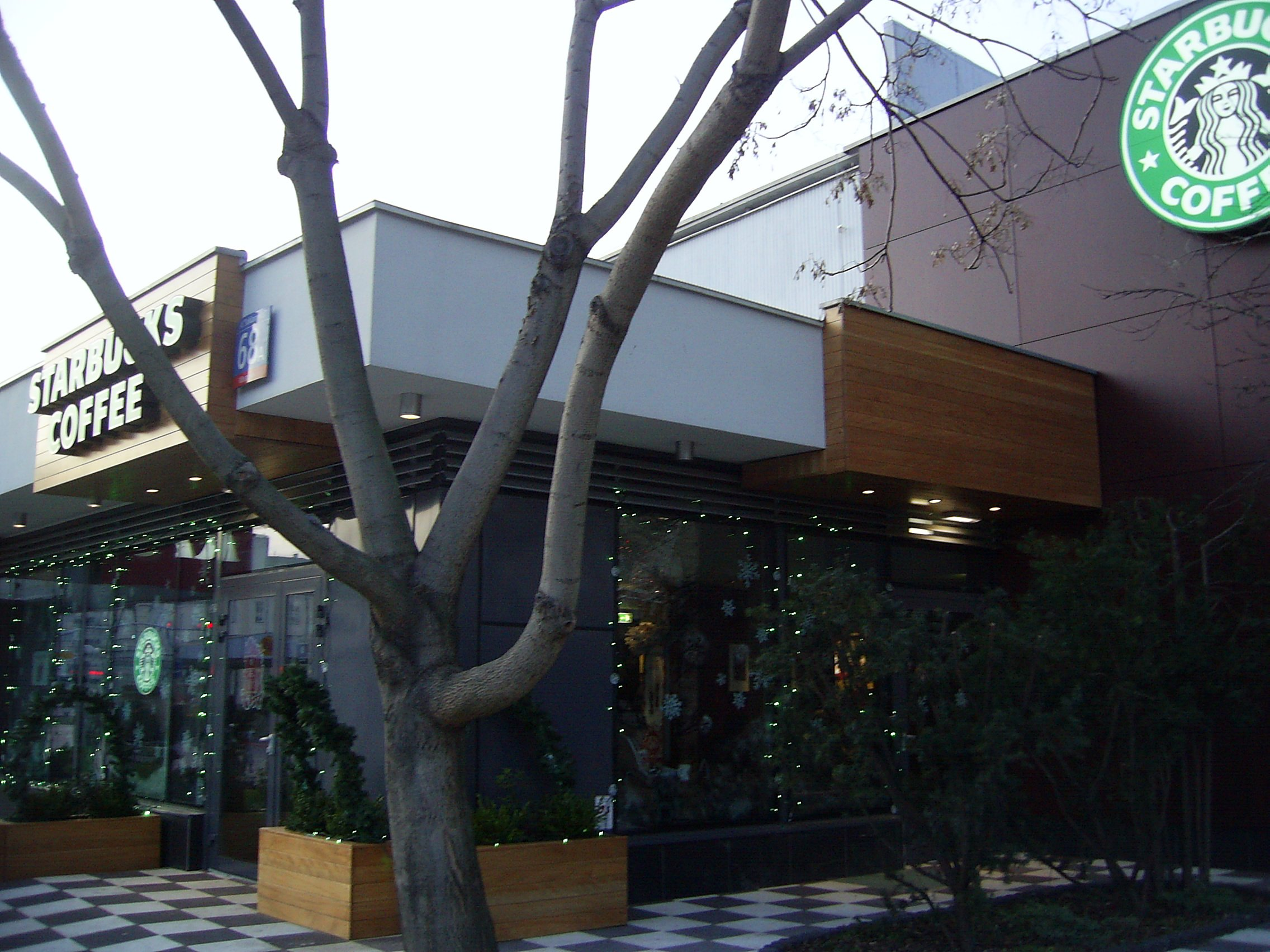 Kawiarnia Starbucks na placu Bankowym w Warszawie